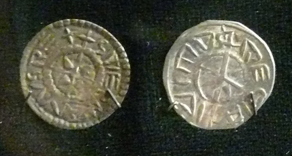 Denár Štěpána I.